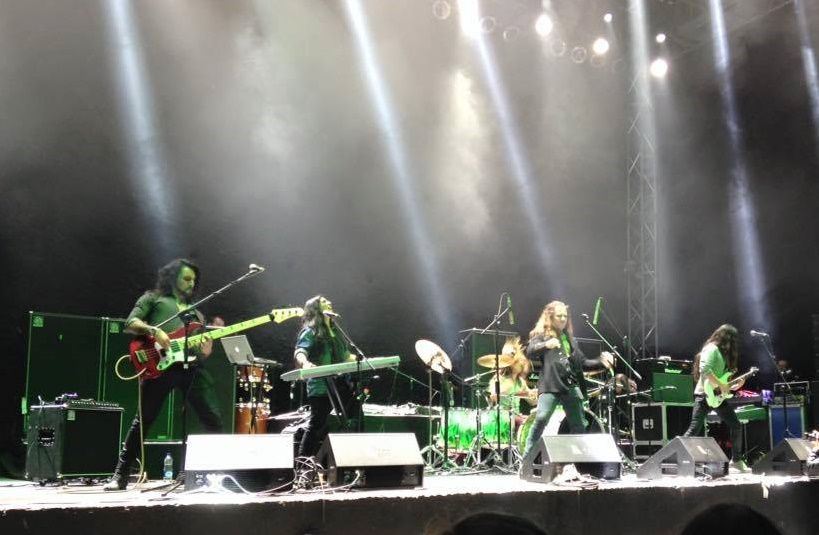 De izquierda a derecha: Pauly Saint-Lyonne, Paulo Cuevas, GG Andreas, Harold Waller, Danny Acosta